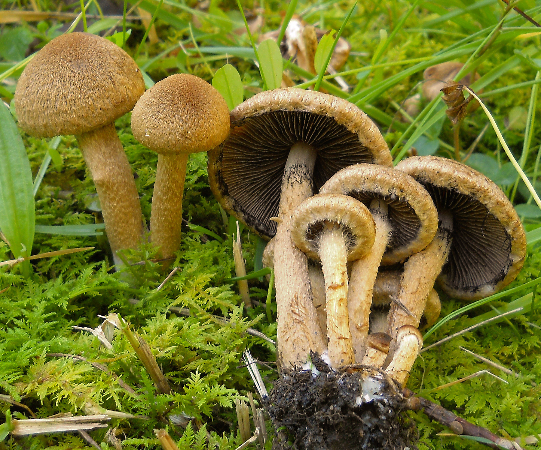 Lacrymaria lacrymabunda (Bull.) Pat.